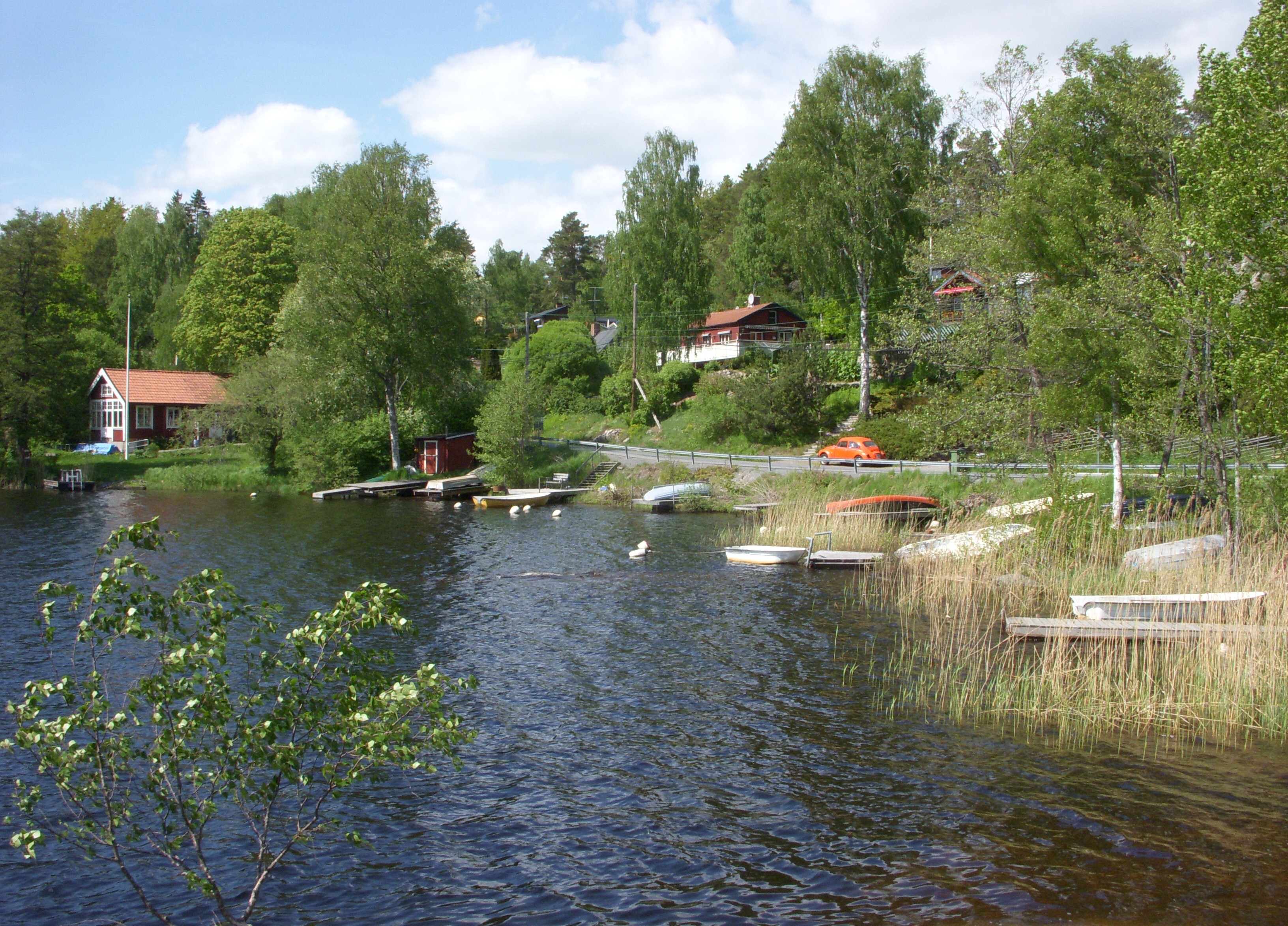 Kvarnsjön och tätorten Gladö kvarn i Huddinge Kommun